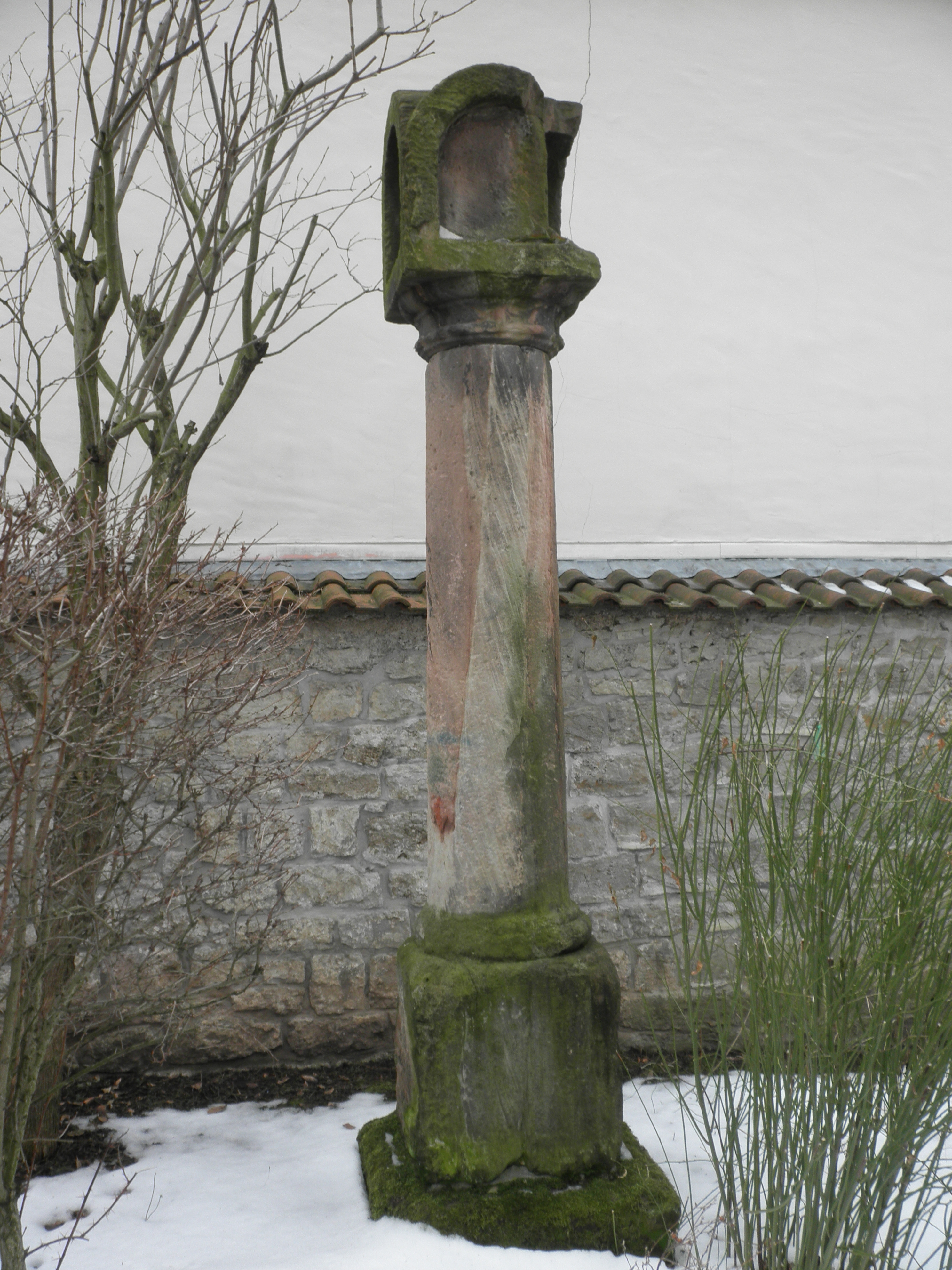 Pestsäule nahe der Kirche